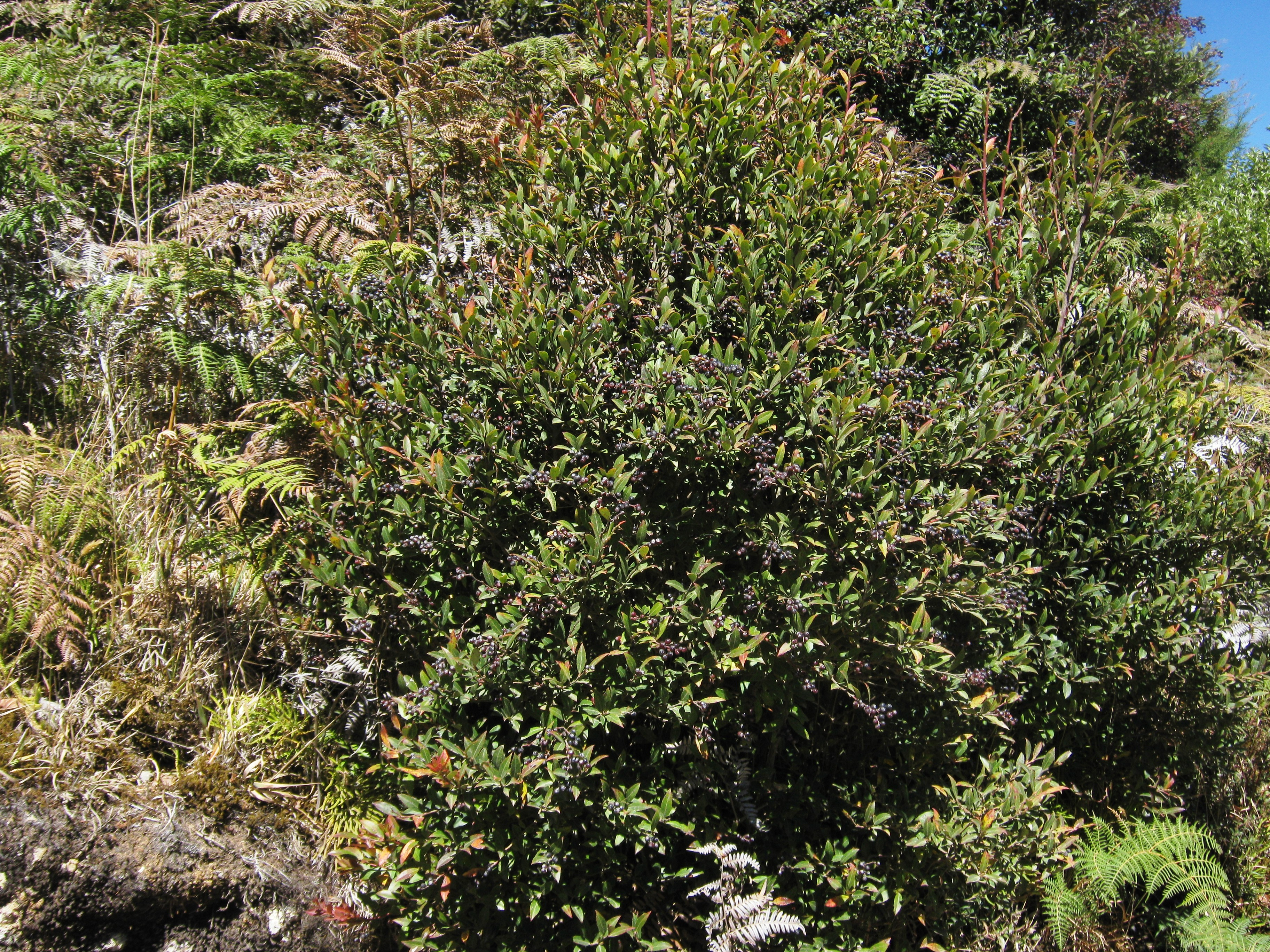 Fotos tomadas en trinidad, Dota